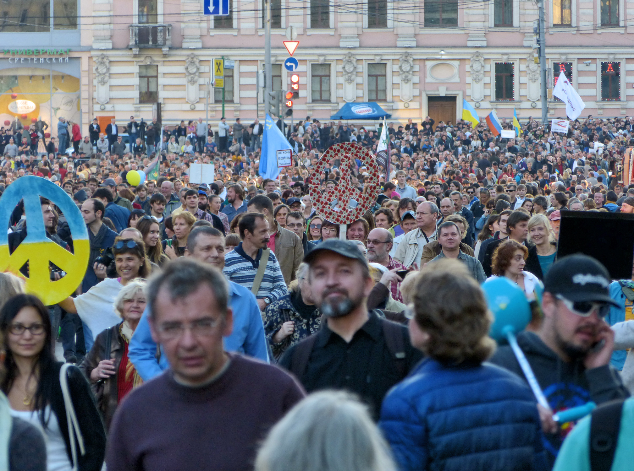 Общероссийский марш мира против вторжения войск путинского режима на Украину. Москва, Бульварное кольцо и проспект Академика Сахарова, 21 сентября 2014 года. На фото: участники марша, пройдя по Бульварному кольцу, на Тургеневской площади поворачивают на проспект Академика Сахарова и идут по нему. Надпись на плакатике: «Не хочу войны с Украиной».